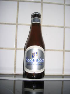 Flesje 25cl Hoegaarden